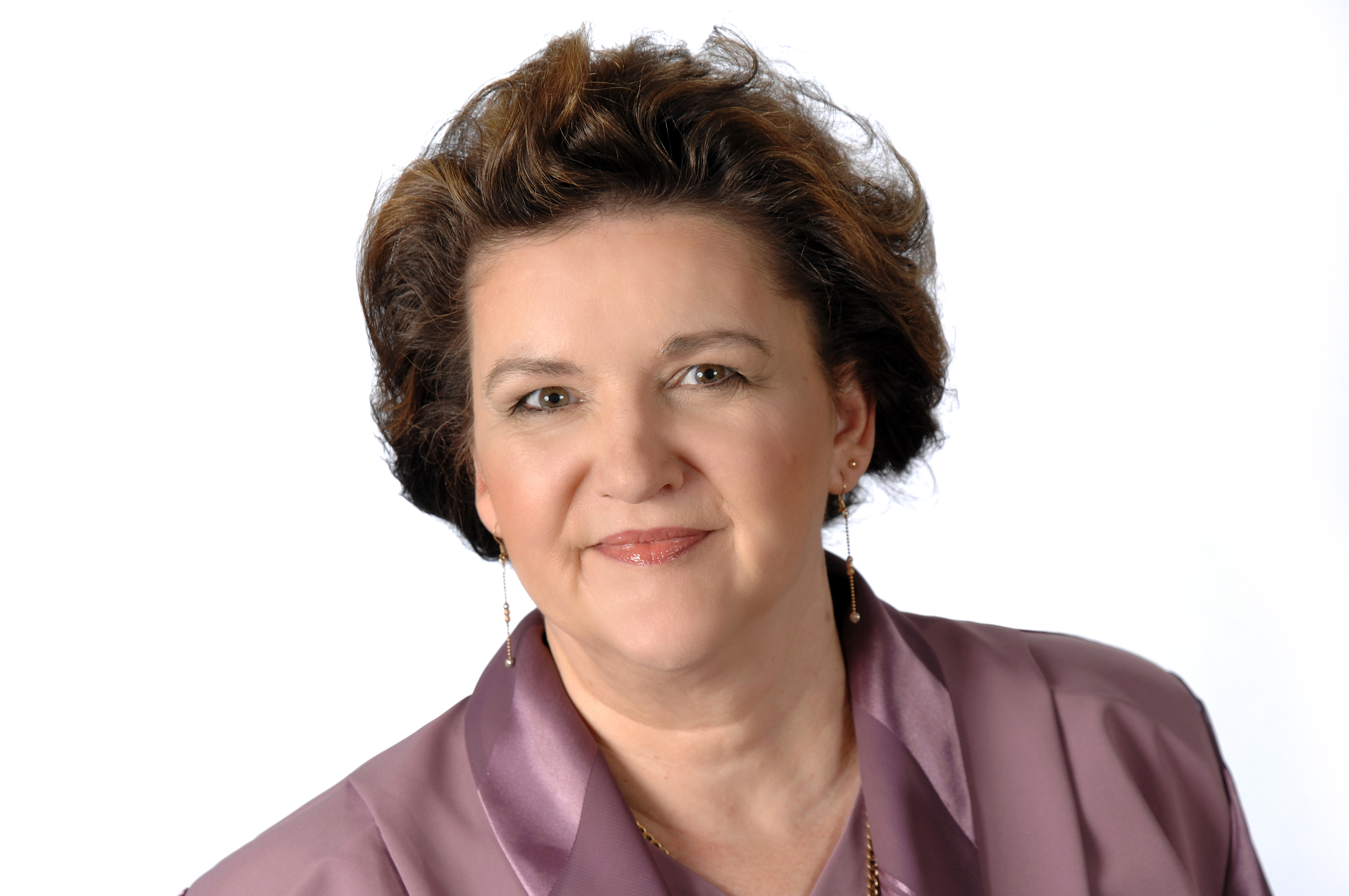 Andrea Rugbarth, September 2010